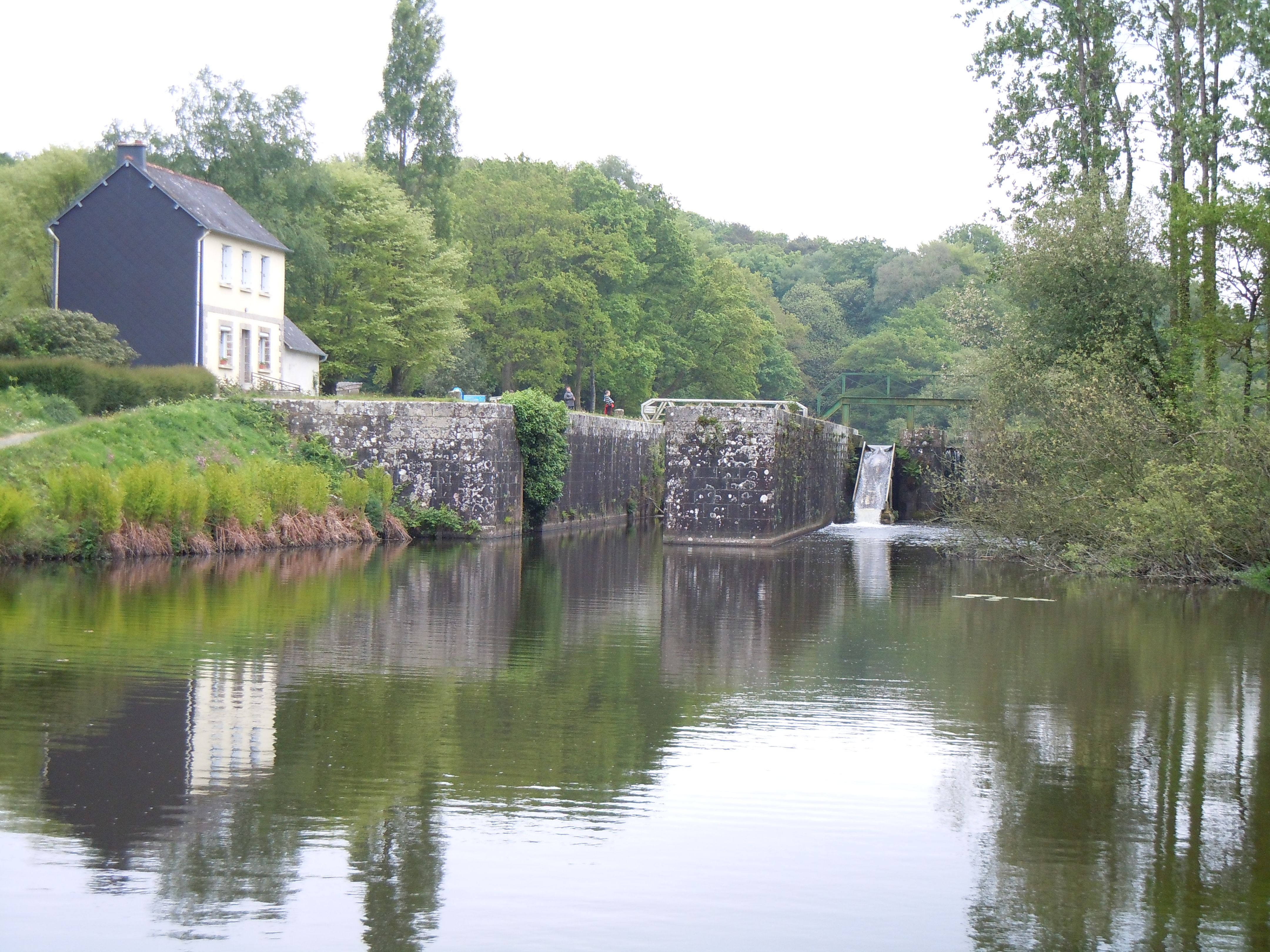 maison d'éclusier et écluse sur le canal de Nantes à Brest à Glomel dans les Côtes d'Armor en Bretagne